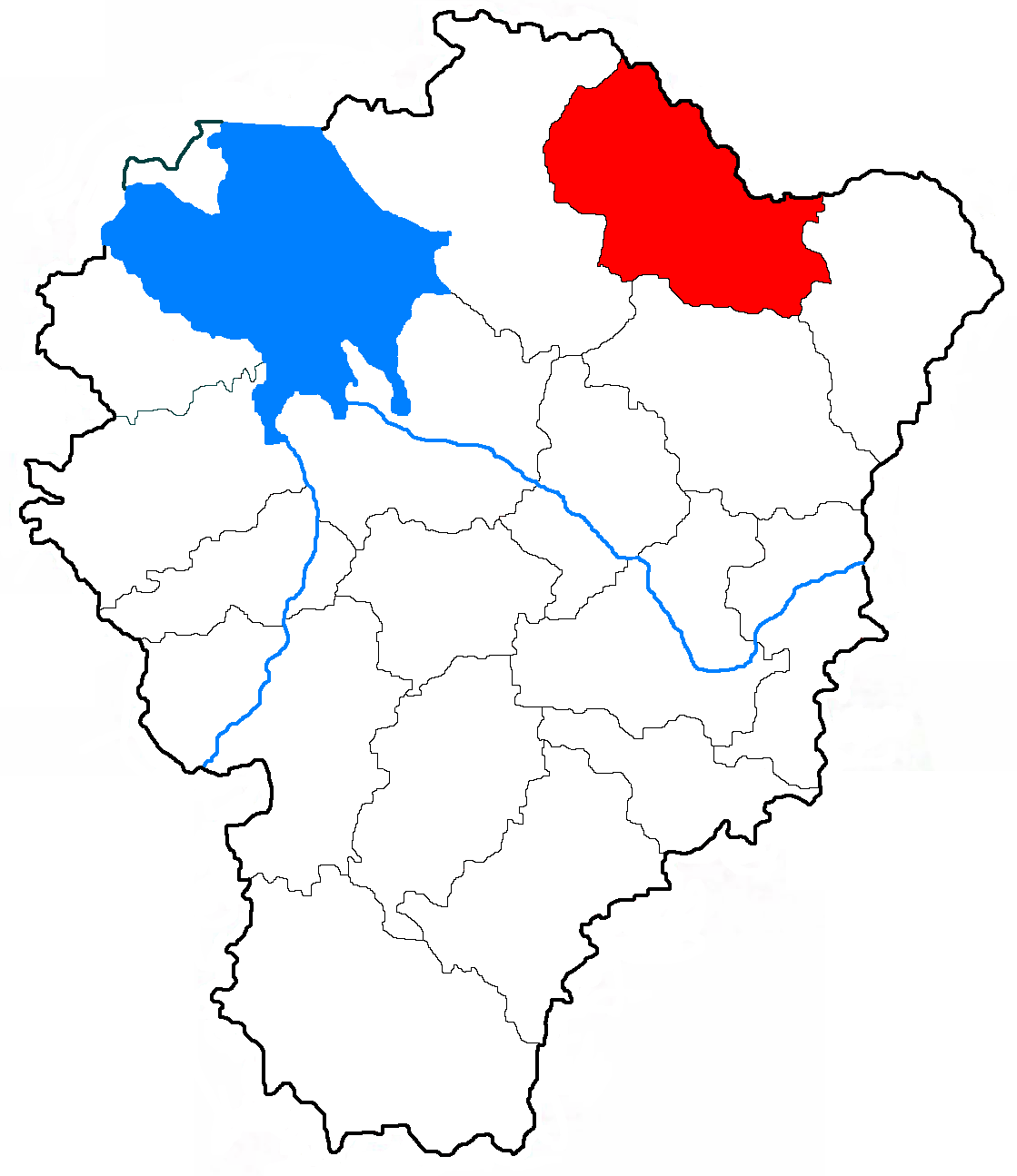 Первомайский район Ярославской области на карте области.